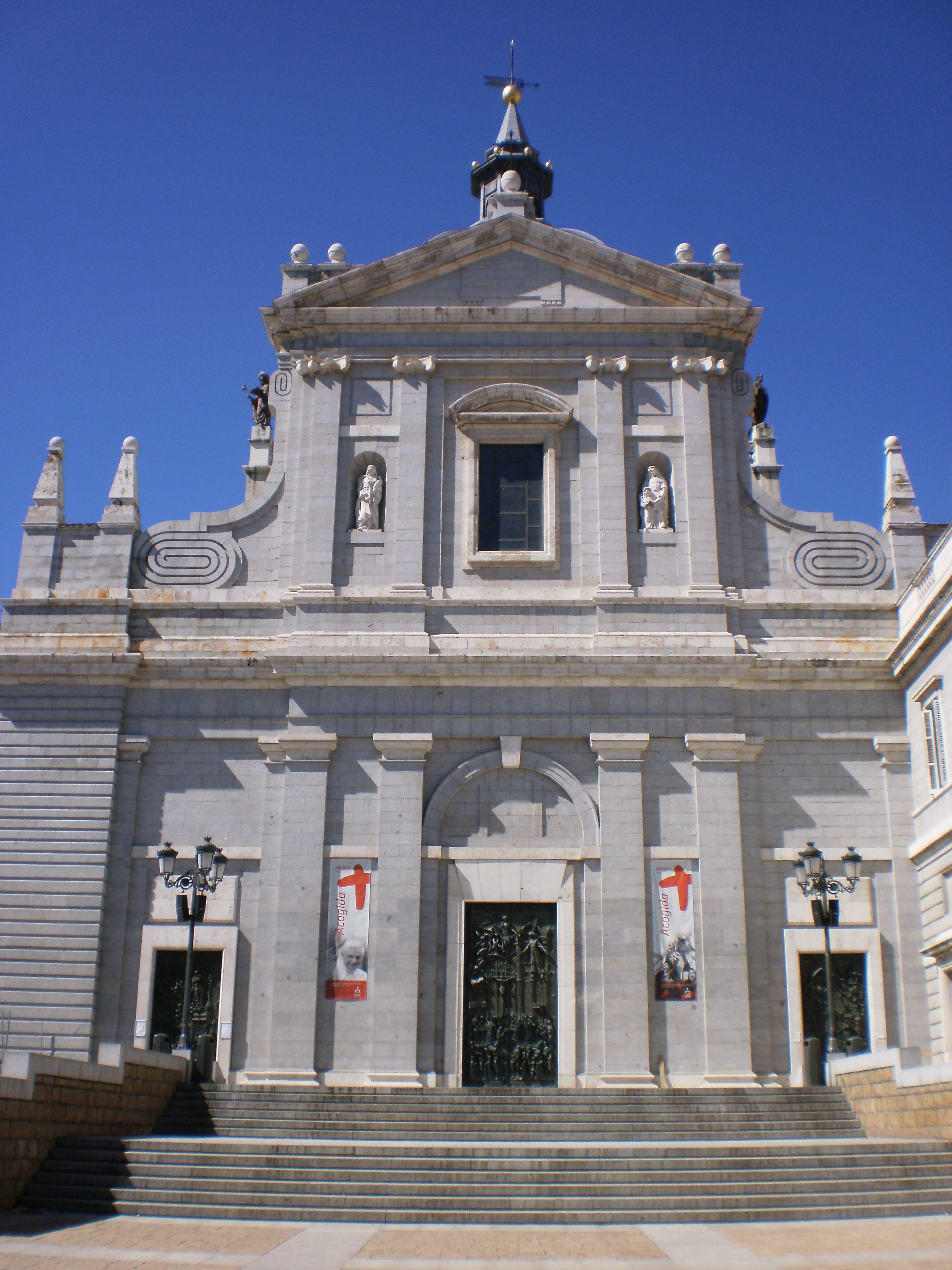 Almudena Cathedral, Madrid